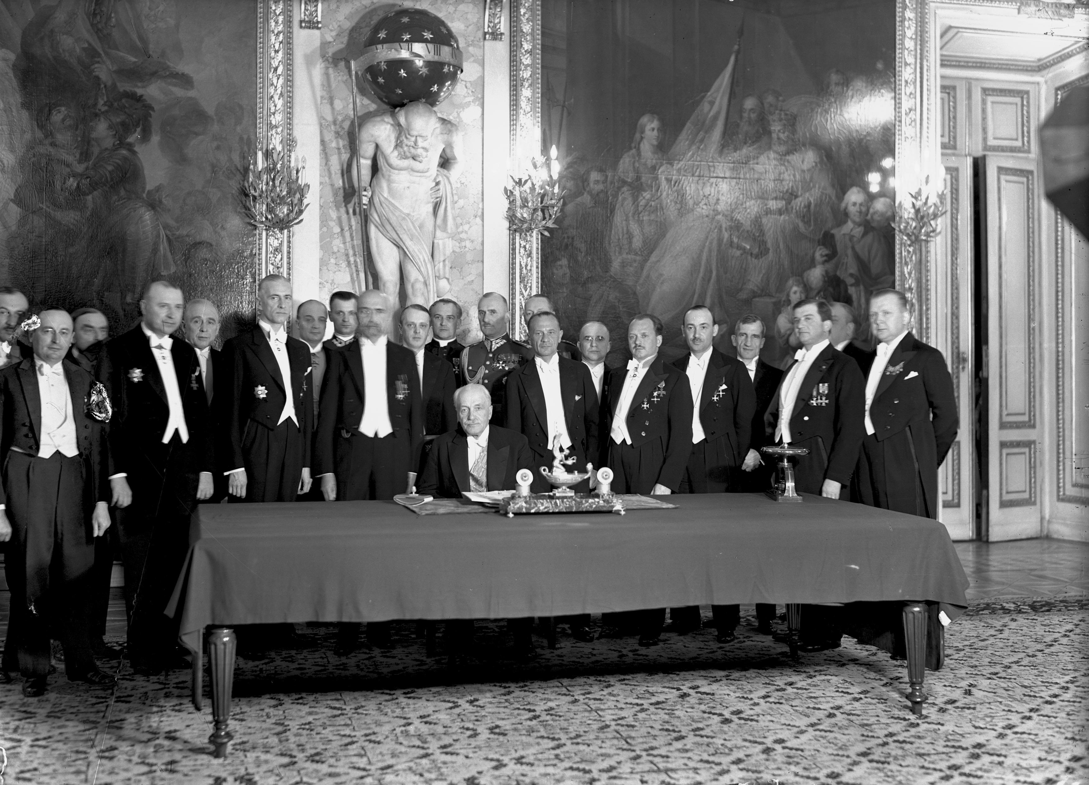 Podpisanie Konstytucji przez prezydenta RP Ignacego Mościckiego w Sali Rycerskiej na Zamku Królewskim. Widoczni m.in. premier Walery Sławek, minister spraw wewnętrznych Marian Zyndram Kościałkowski, szef Gabinetu Wojskowego Prezydenta RP pułkownik Jan Głogowski, szef Kancelarii Cywilnej Prezydenta RP Stanisław Świeżawski, wicemarszałek sejmu Stanisław Car, marszalek sejmu Kazimierz Świtalski, marszałek senatu Władysław Raczkiewicz, szef Protokołu Dyplomatycznego Ministerstwa Spraw Zagranicznych Karol Romer (na prawo za W. Raczkiewiczem), minister komunikacji Michał Butkiewicz, minister poczt i telegrafów Emil Kaliński, minister przemysłu i handlu Henryk Floyar-Rajchman (2. z lewej), minister opieki społecznej i ochrony pracy Jerzy Paciorkowski, minister rolnictwa i reform rolnych Juliusz Poniatowski, minister wyznań religjnych i oświecenia publicznego Wacław Jędrzejewicz, kapelan prezydenta RP ks. prałat Jan Humpola (stoi w głębi za prezydentem), adiutant prezydenta RP kpt. Józef Hartman (w głębi, na prawo za K. Romerem).